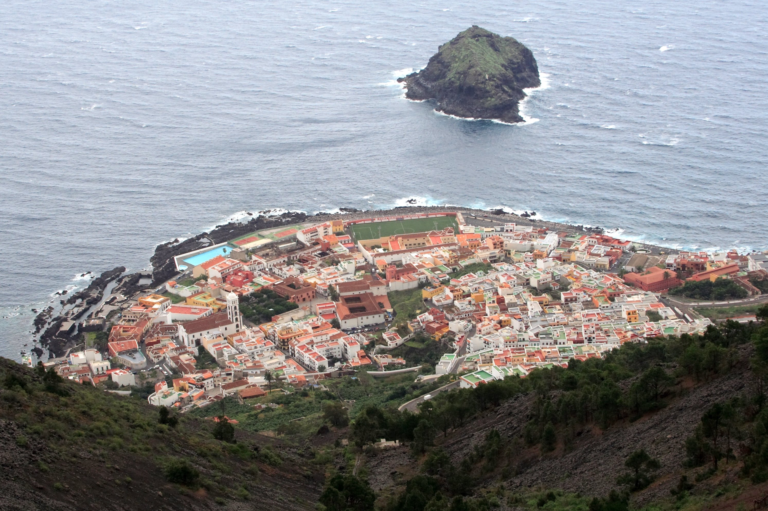 garachico-total